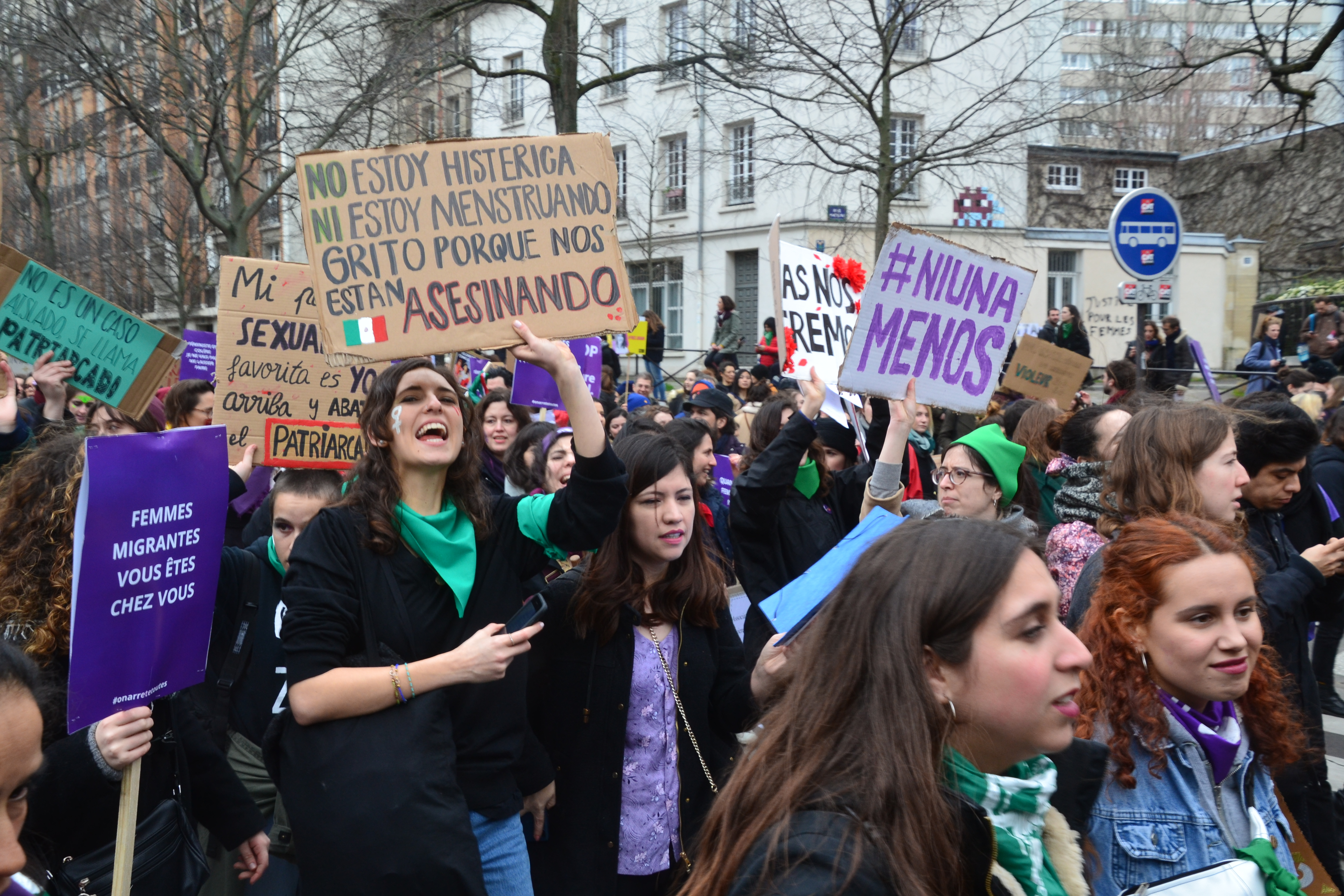 Journée internationale des droits des femmes.